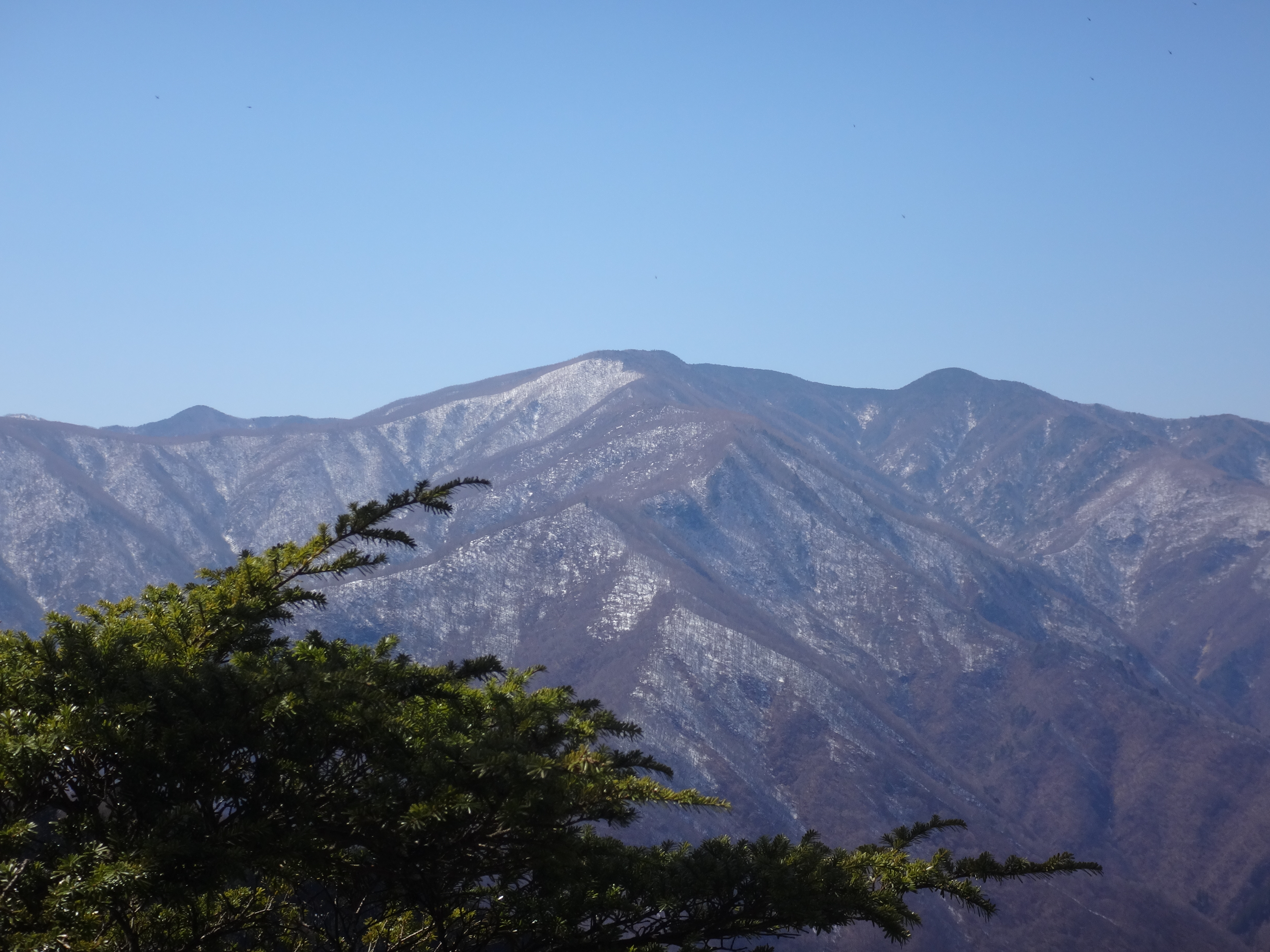 妙法が岳からの白石山（和名倉山）